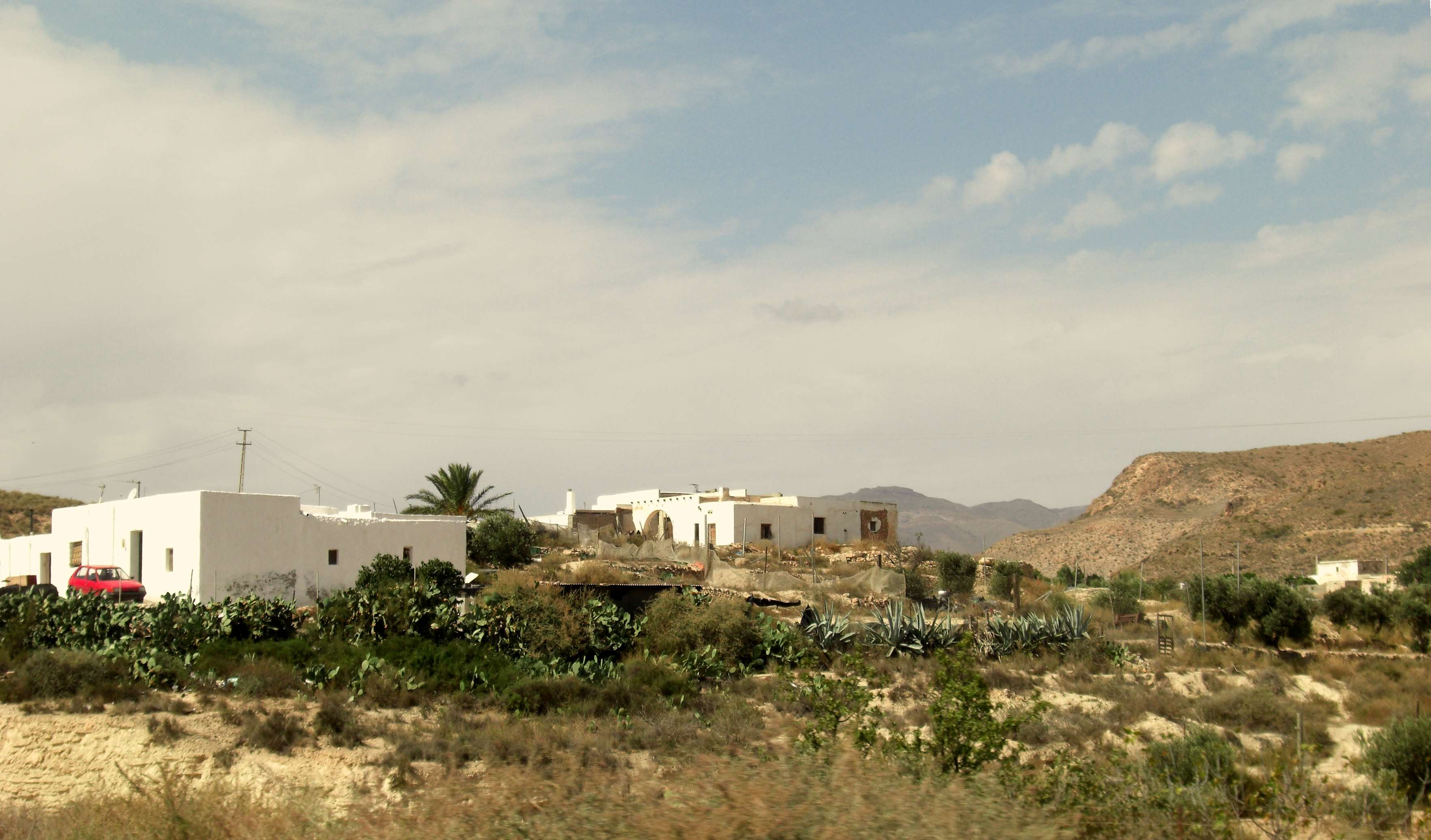 Níjar - Cortijos típicos